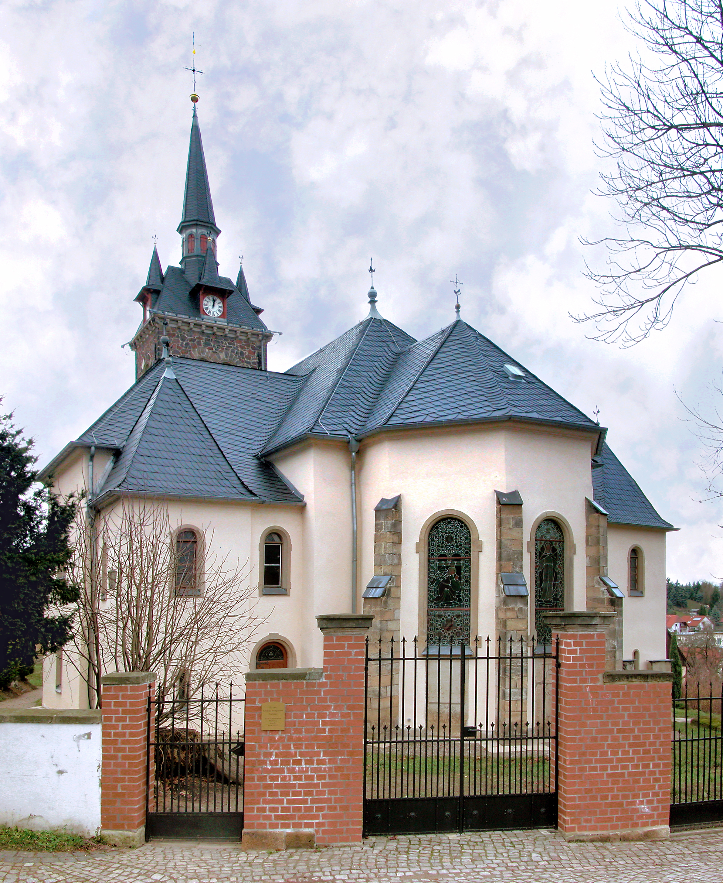 29.11.2009 01665 Constappel (Klipphausen): Ev.-Luth. Dorfkirche St. Nikolai (GMP: 51.104810,13.565966). Im Kern spätromanisch, später stark verändert. 1884 erweitert. Sicht von Osten, Chorpartie. [DSCN40303-40304.TIF]20091129010MDR.JPG(c)Blobelt